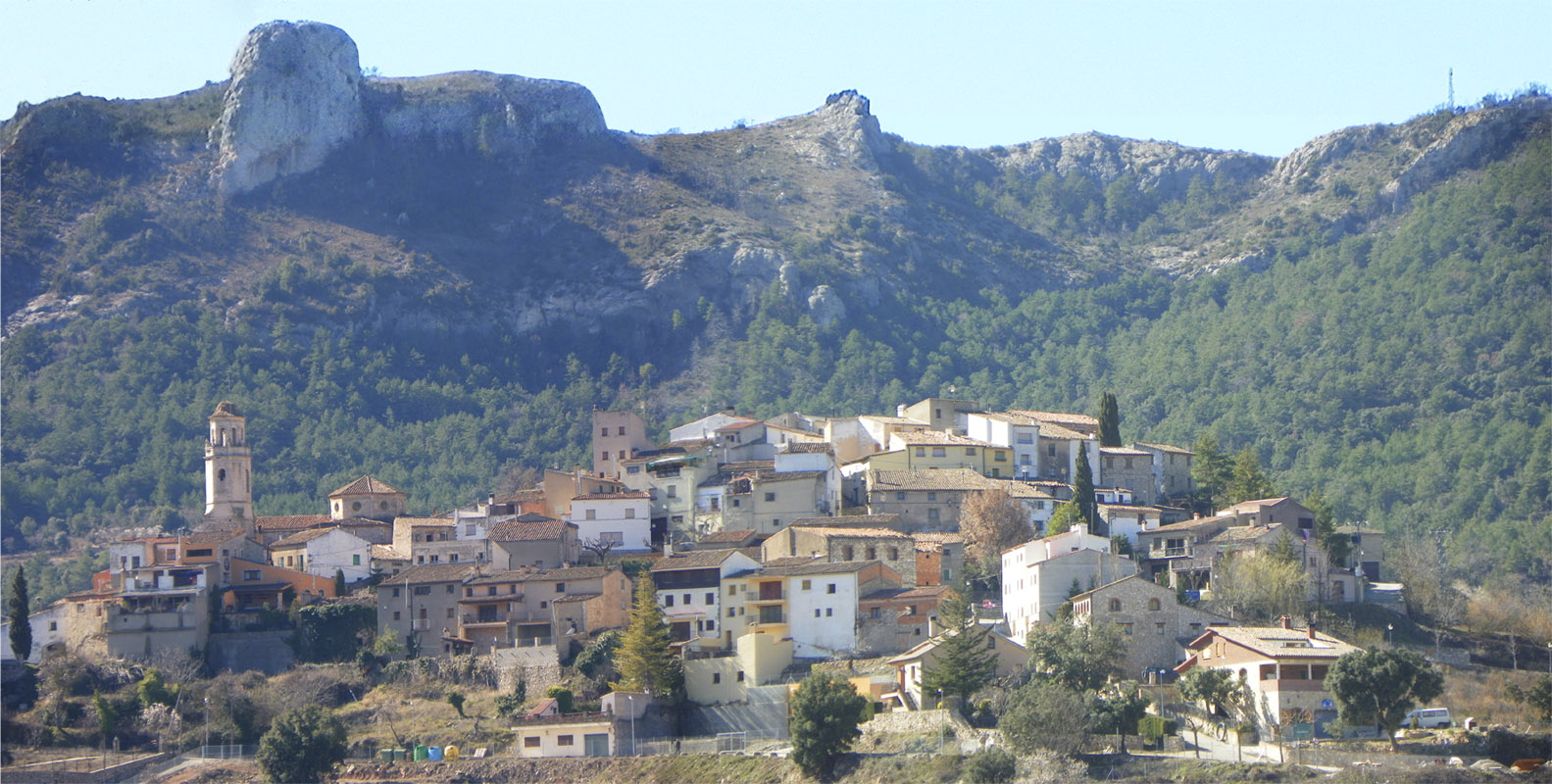 Capafonts